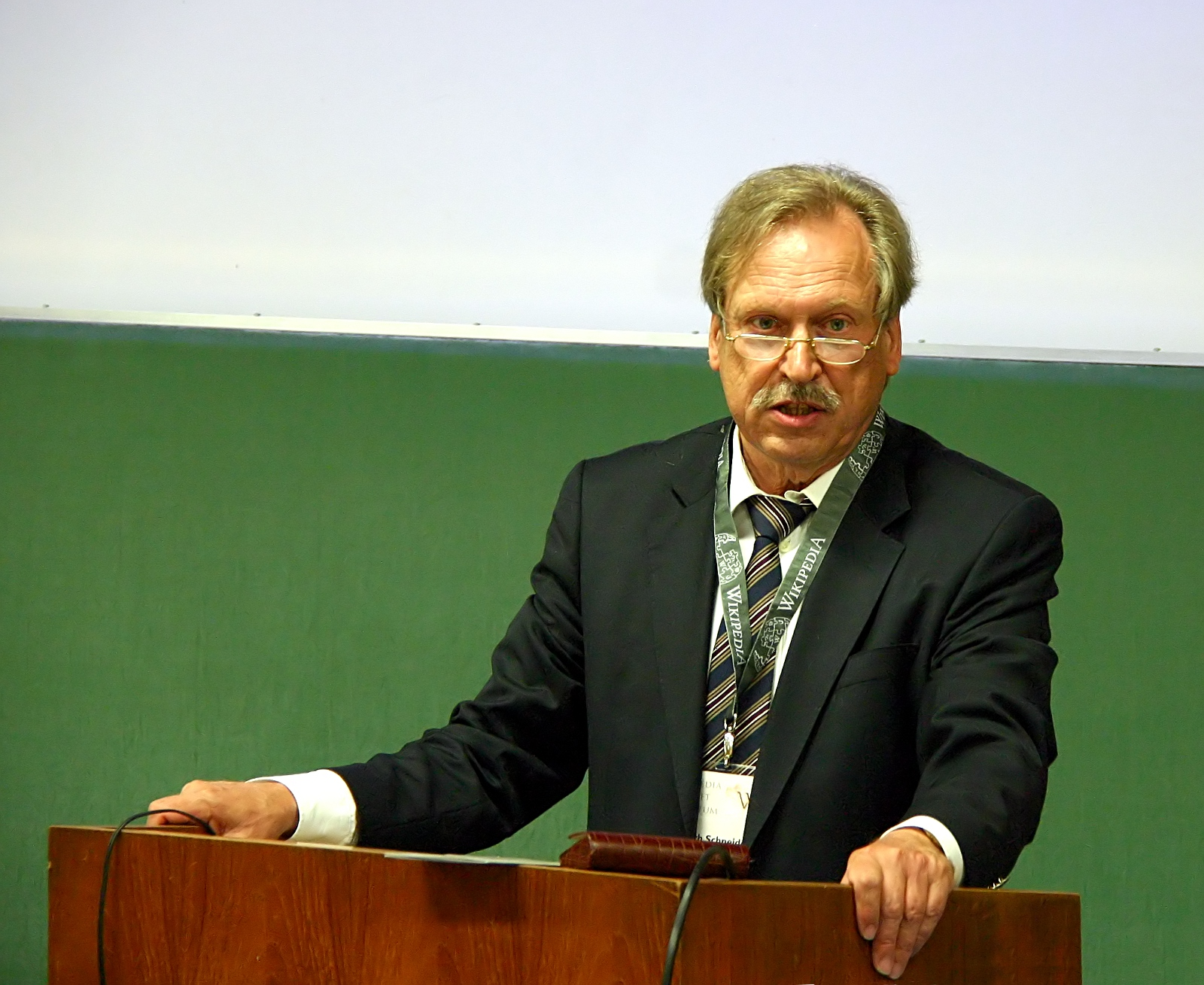 Wikipedia trifft Altertum - Prof. Dr. Helmuth Schneider (Universität Kassel), Wissenschaftliche Lexika zwischen Consens und Innovation. Probleme und Möglichkeiten des Internets.